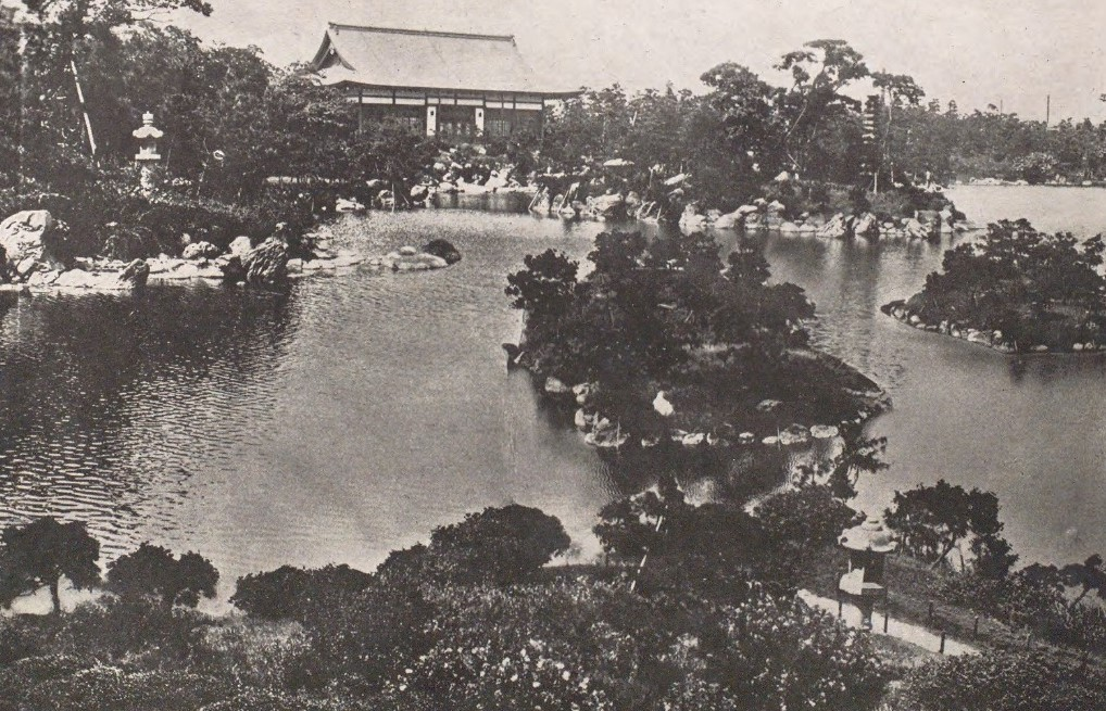 清澄公園。岩崎家の元屋敷で東京市に寄付された。園内に本所公会堂があり、本所深川の労働者街の憩いの場となっている。